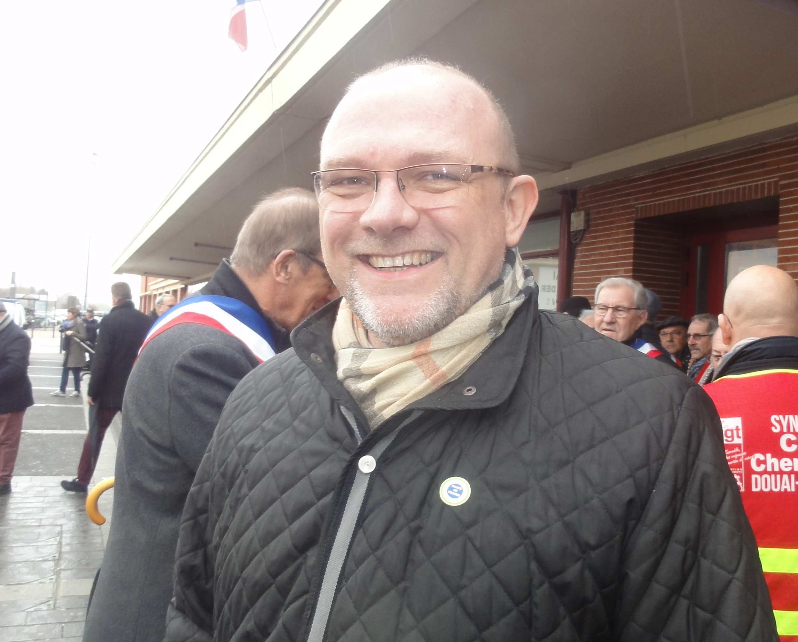 Manifestation contre la suppression des dessertes TGV en gare de Douai le 2 mars 2019. Depicted place: Douai railway station Depicted person: Frédéric Nihous – French politician